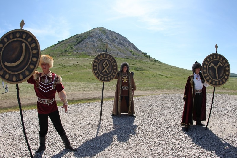 Salavat bayramı (başq. Salauat yıyını) — Salavat Yulayev günləri çərçivəsində qeyd olunan respublika səviyyəli folklor bayramı.